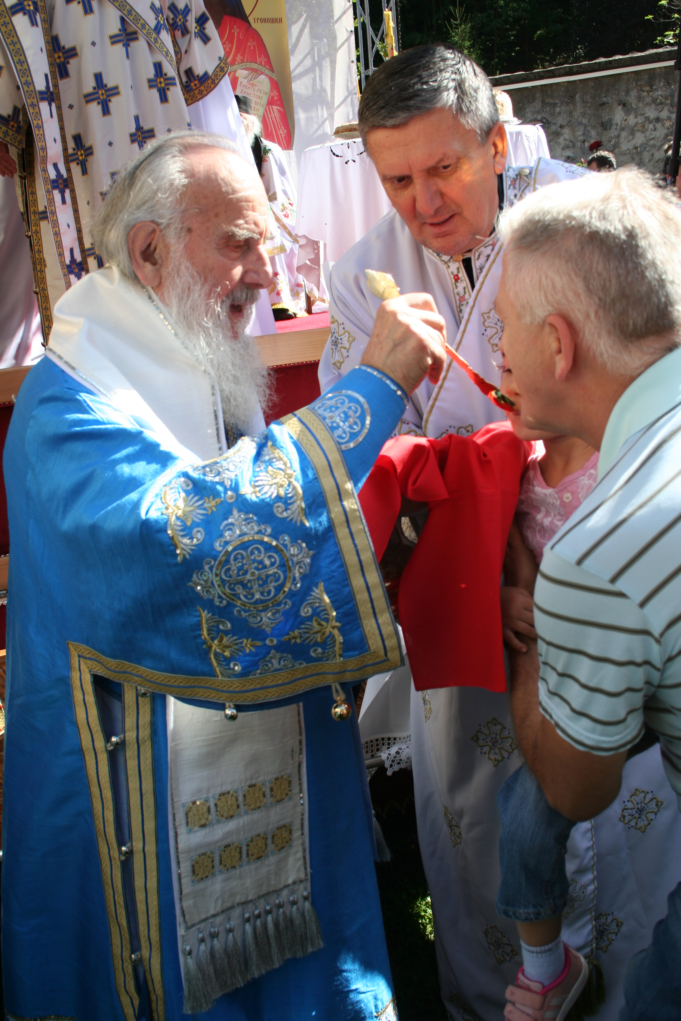 Manastir Tronoša-proslava 700 godina postojanja